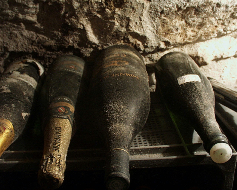 Bilder aus Reims